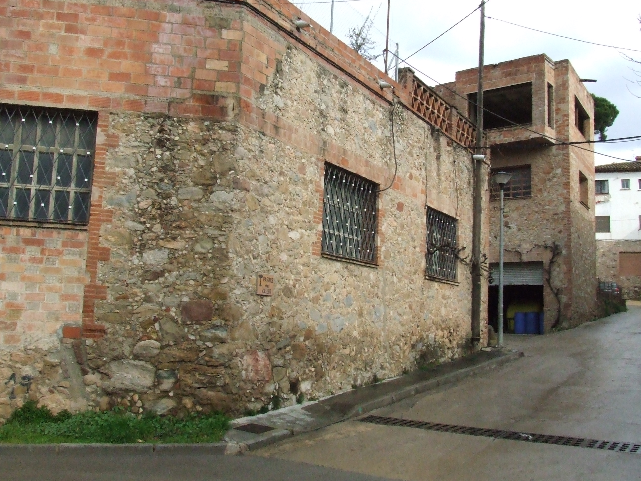 Molí d'oli de Can Sapera (Bigues, Bigues i Riells, Vallès Oriental).